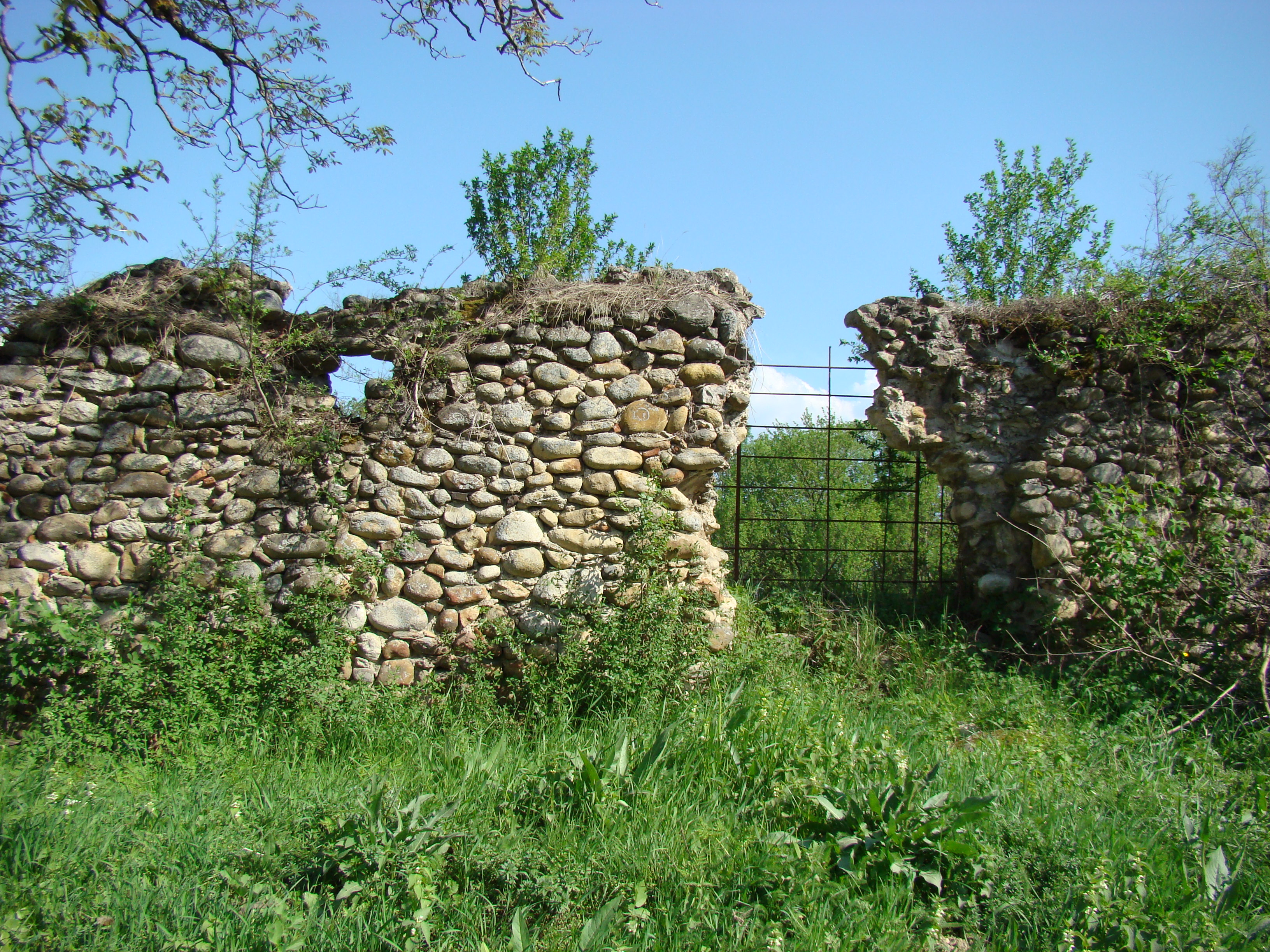 Curtea cnezilor Cândreş, sat SĂLAŞU DE SUS; comuna SĂLAŞU DE SUS